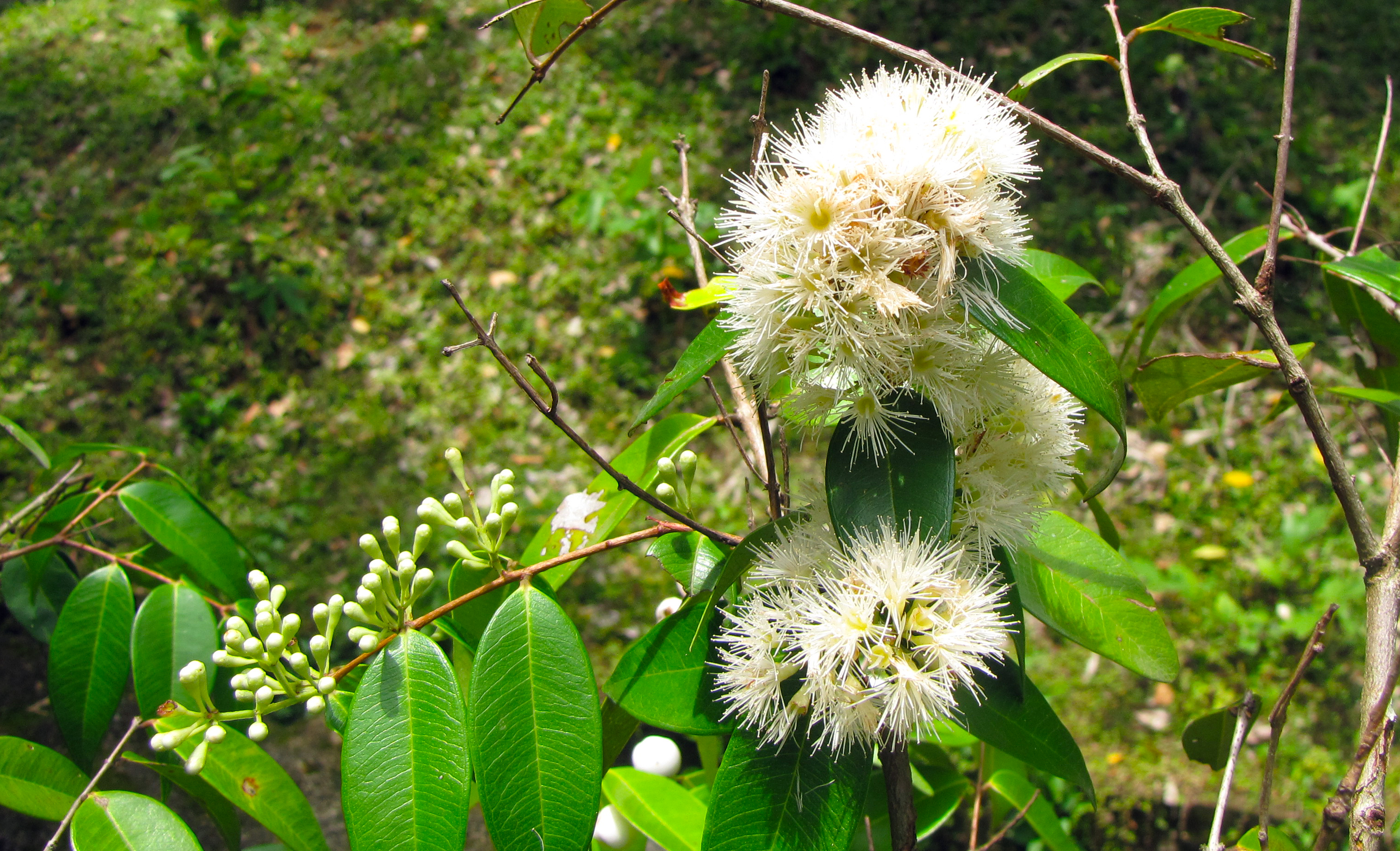 പൂച്ചപ്പഴത്തിന്റെ പൂവ്